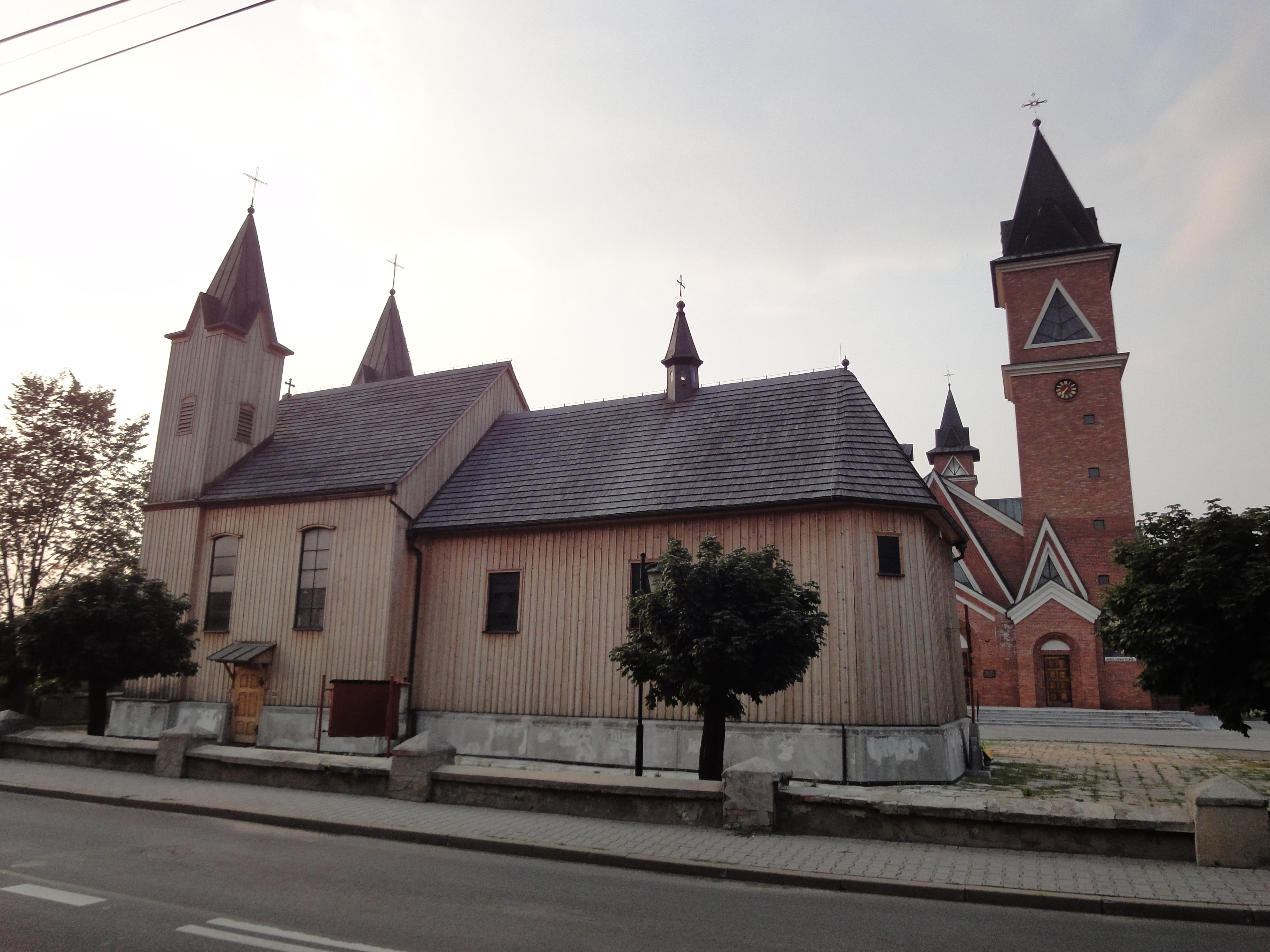 Zdjęcie przedstawia zabytkowy kościół w Bobrownikach